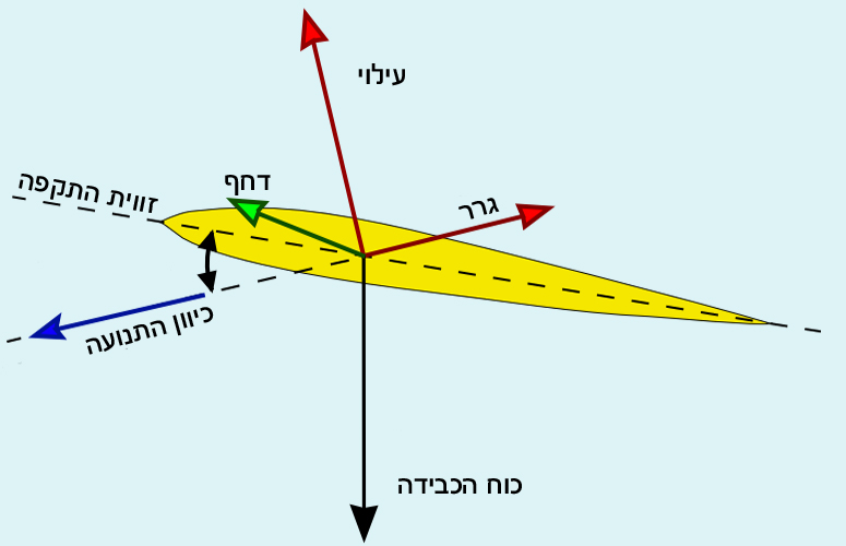 תורגם מהתמונה Lift-force-en.svg בוויקישיתוף.